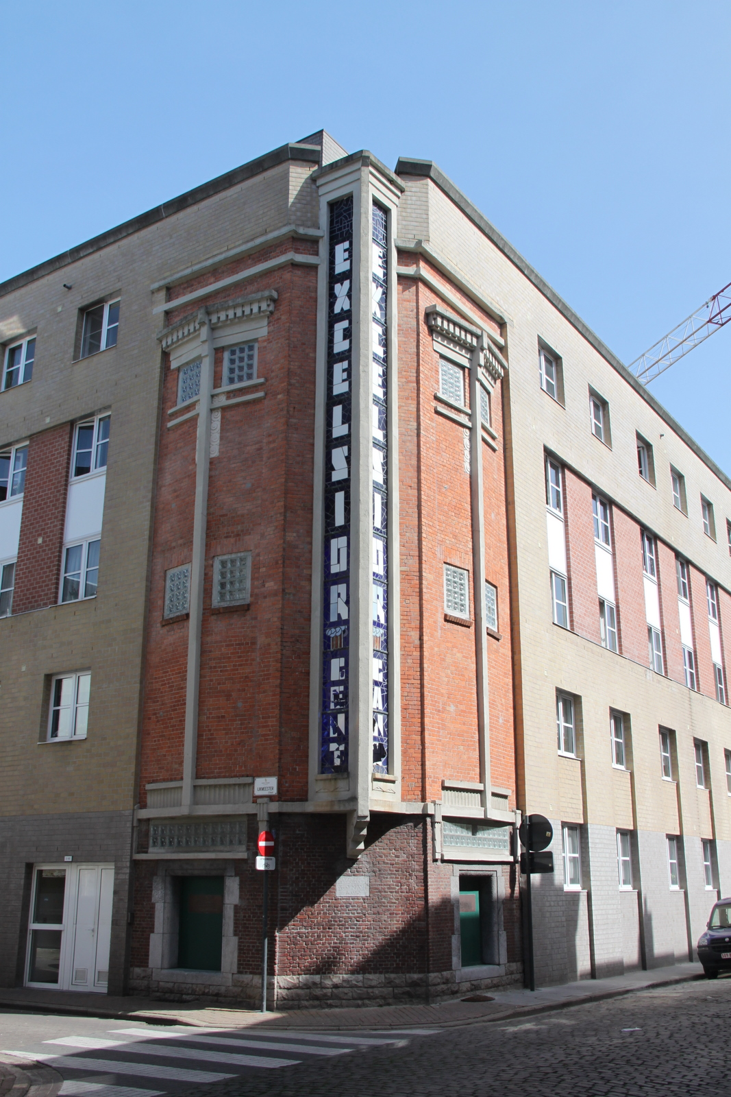 Ghent, Belgium on 2011-04-10